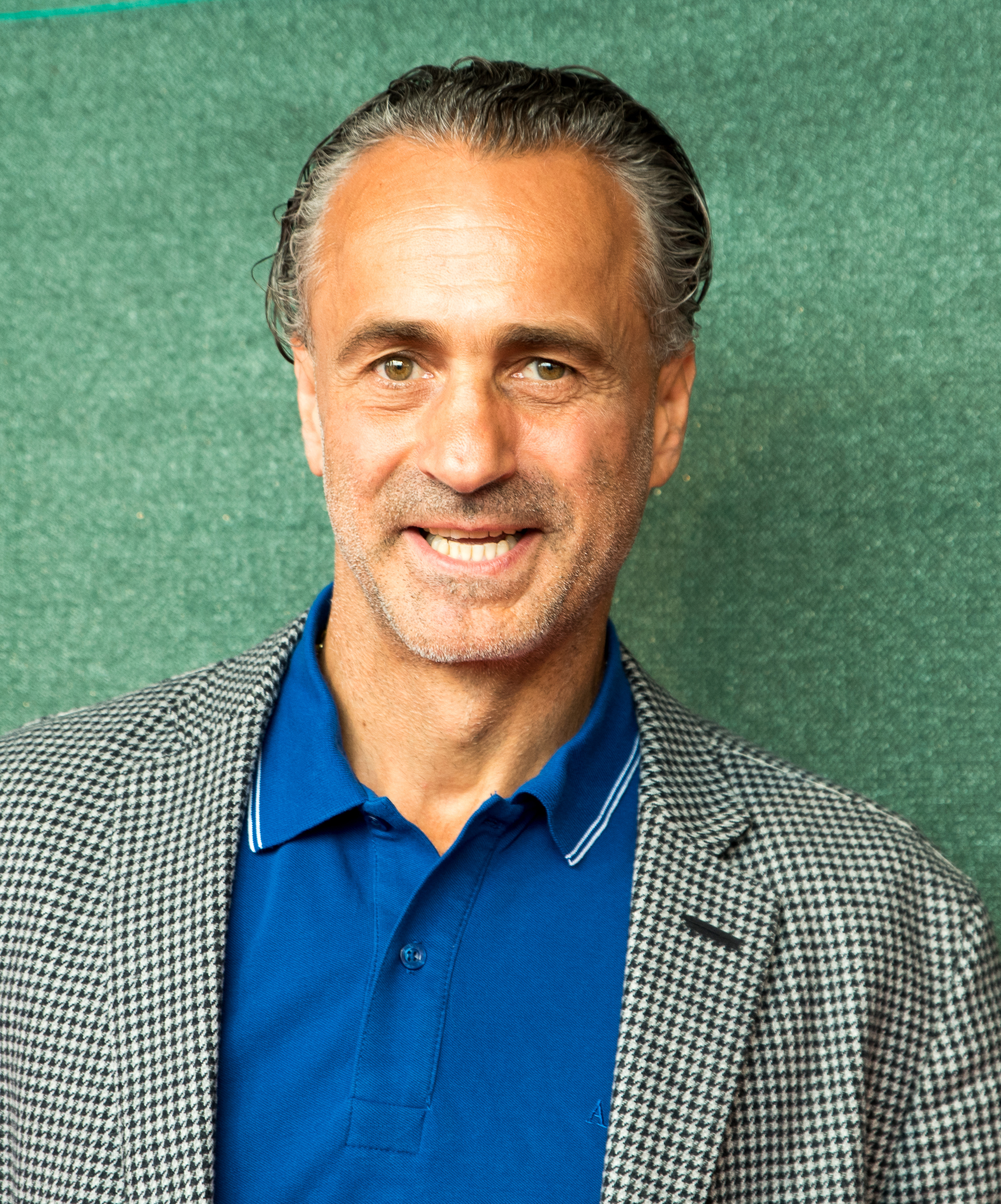 Maurizio Gaudino beim Tag der Legenden 2016